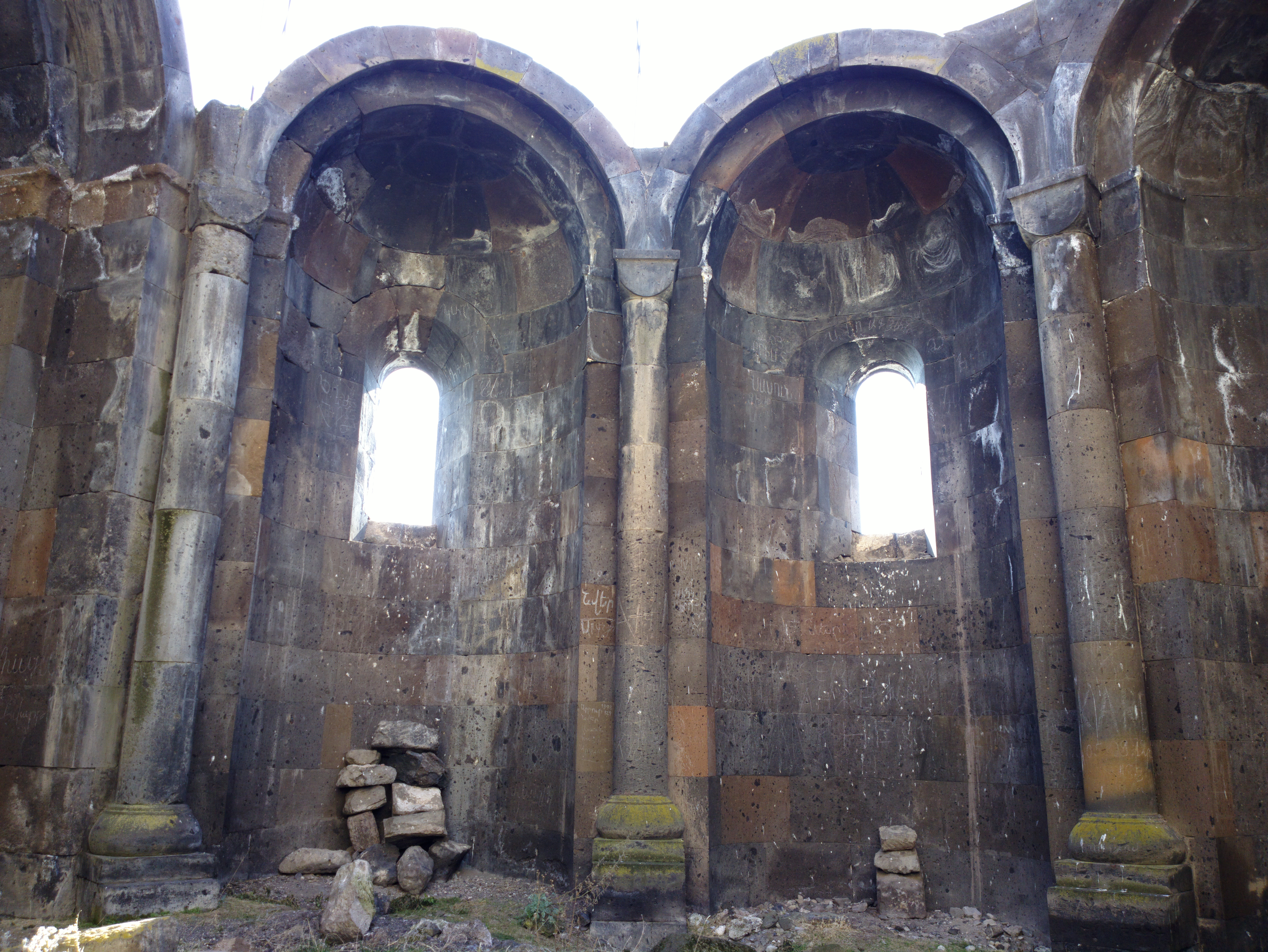 Եկեղեցի Զորավար (Սբ. Թեոդորոս, «Ղարղավանք») 31/2.1